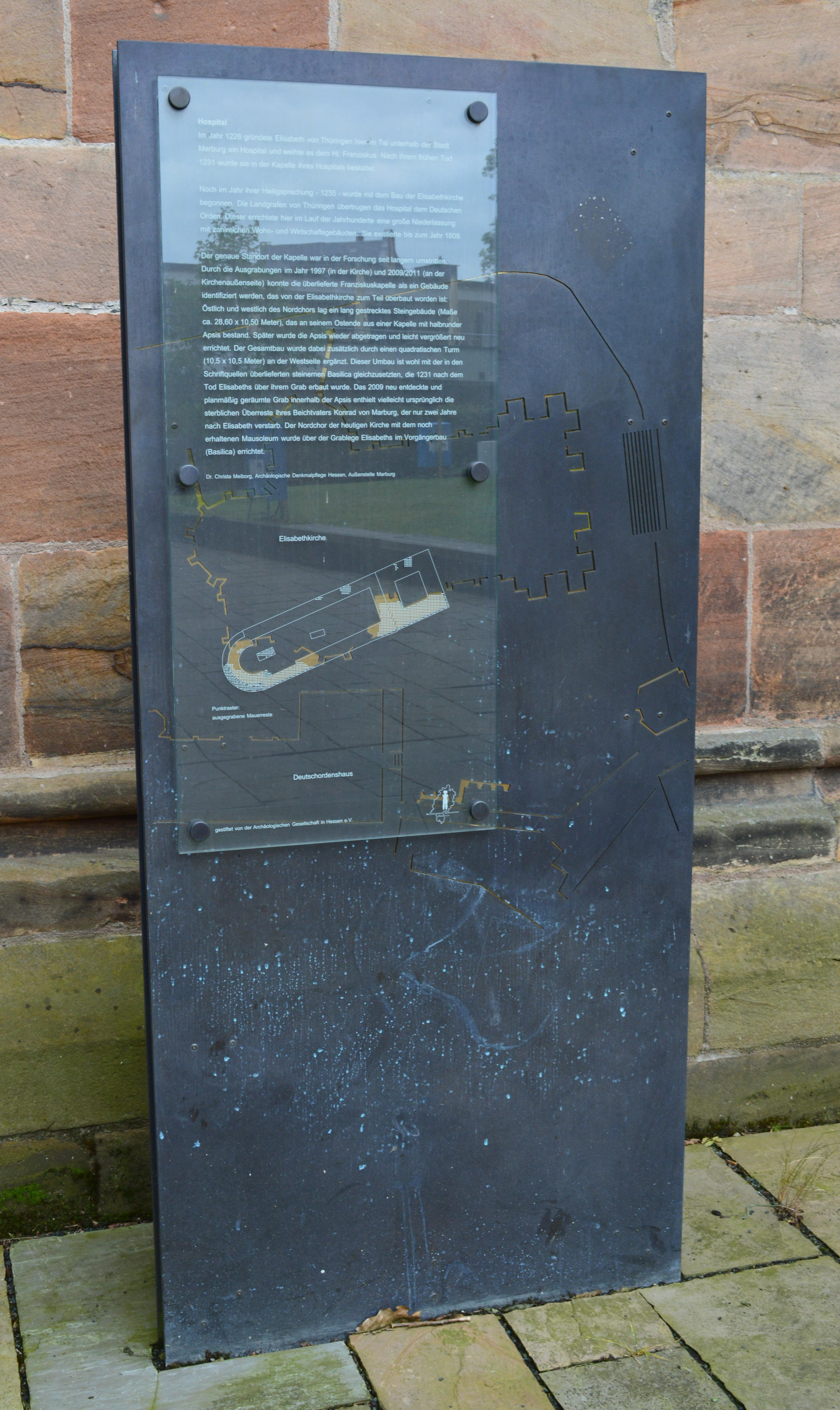 Informationstafel an der Nordseite der Elisabethkirche Marburgs. Blickrichtung südsüdost.